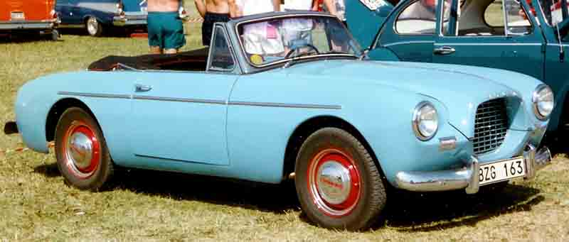 Volvo P1900 Sport Cabriolet 1956